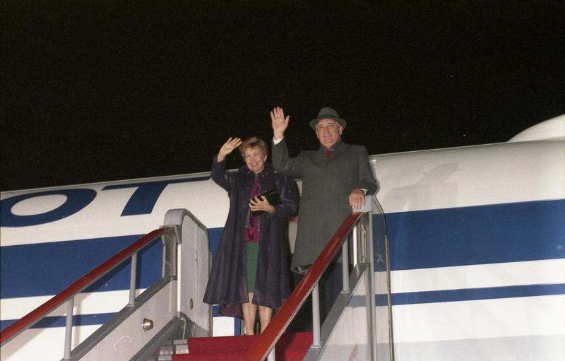 Berlin, Verabschiedung Michail Gorbatschow Berlin: 40. Jahrestag Der Generalsekretär des ZK der KPdSU, Michail Gorbatschow, der mit seiner Gattin Raissa aus Anlaß des 40. Jahrestages der DDR in Berlin weilte, trat am Abend den Rückflug nach Moskau an. Herzlich wurden die Gäste auf dem Flughafen Berlin-Schönefeld verabschiedet. Abgebildete Personen: Gorbatschow, Michail: Präsident, Vorsitzender des Obersten Sowjets, Friedensnobelpreisträger, Sowjetunion